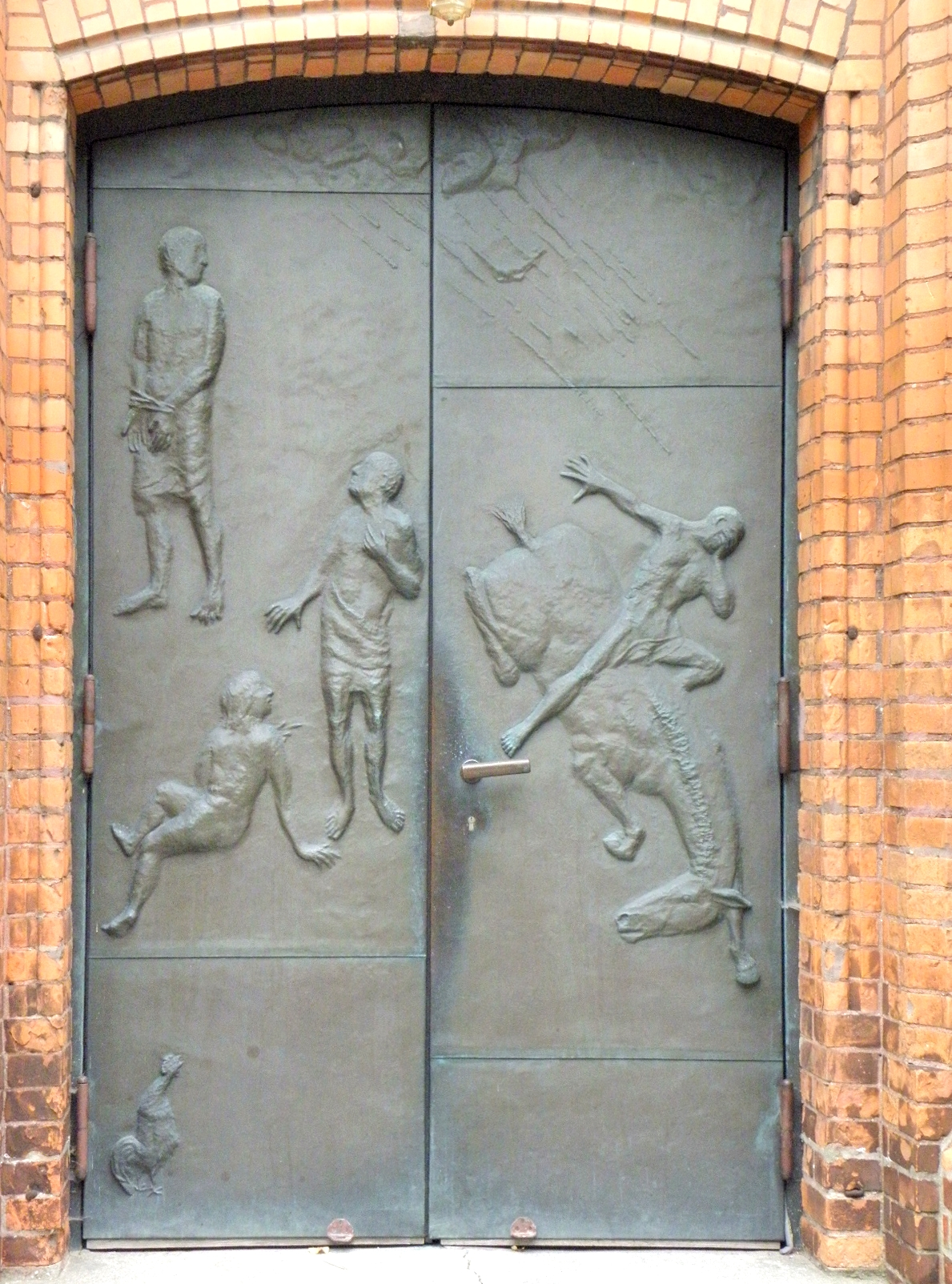 Kirche St. Peter und Paul, Eberswalde. Portal